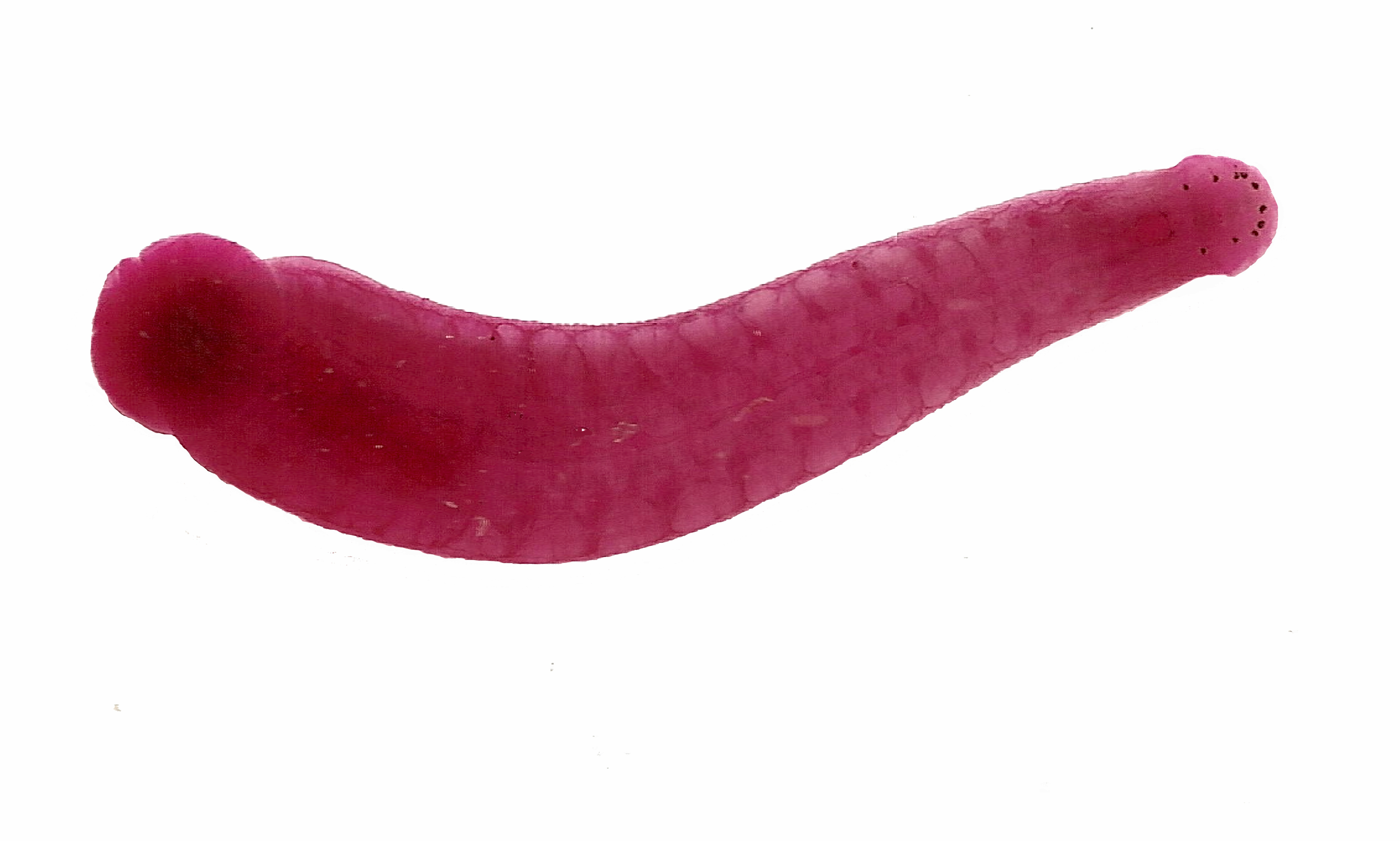 Montaje de un ejemplar del género Helobdella